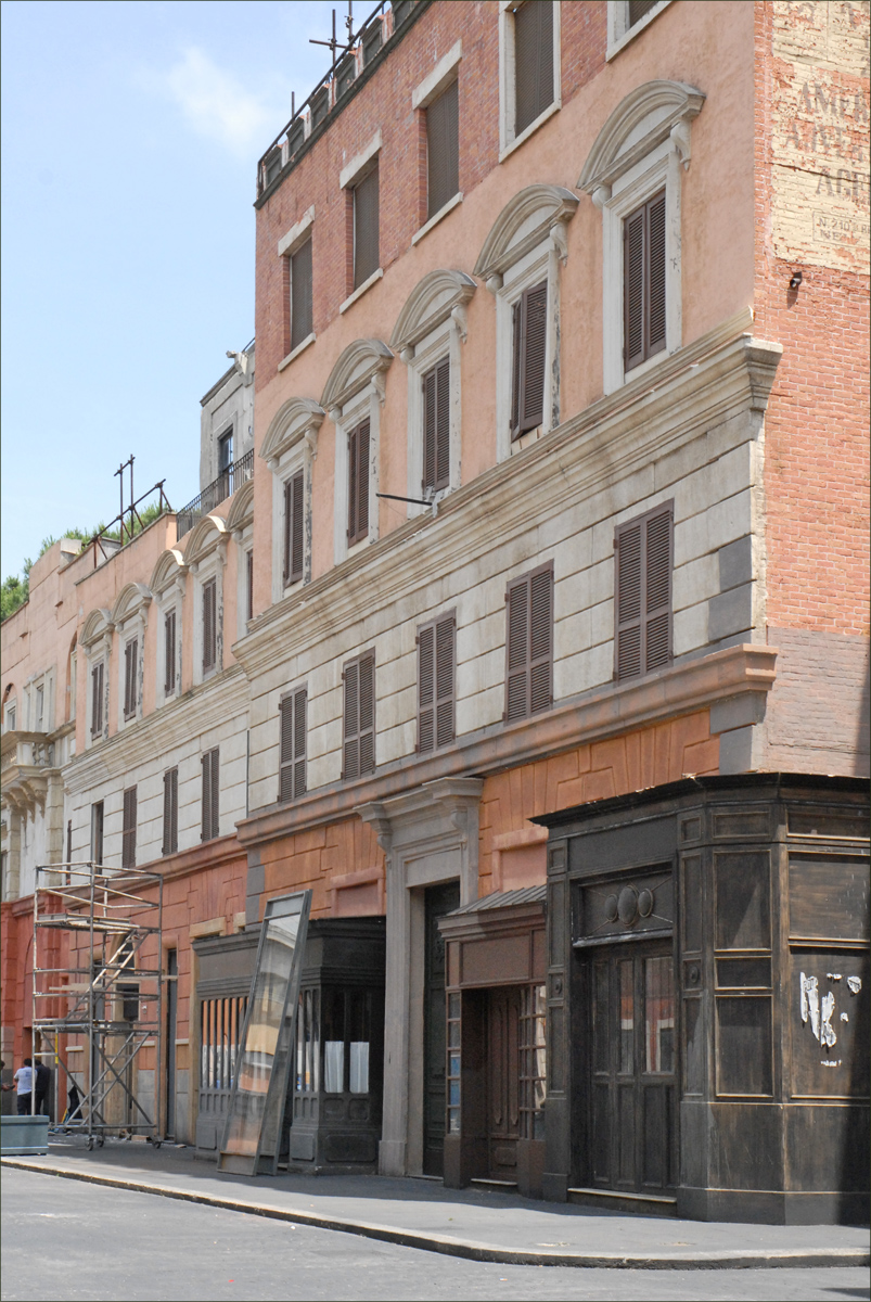 Eléments de décor pour une rue de Paris au XIXè siècle ______ A l'occasion du 150e anniversaire de l'unification de l'Italie, les Studios Cinecittà sont ouverts au public dans le cadre d'une exposition intitulée "Cinecittà si Mostra". A l'entrée, le petit pavillon Cinears rend hommage à la famille De Angelis, spécialisée dans la reproduction de sculptures. Dans le bâtiment face à l'entrée des studios, une exposition décrit la manière de réaliser un film : costumes, accessoires, dessins, décors, scénarios, photographies, montage, post-production. Dans un autre bâtiment (Fellini building), une exposition est consacrée à l'histoire de Cinecittà, à des portraits d'acteurs, à l'oeuvre de Fellini, à la formation des comédiens, aux débuts d'actrices et d'acteurs italiens célèbres. Un espace particulier est destiné aux enfants. L'exposition permet également de visiter des plateaux de tournage avec décors en situation : une rue de Brodway au 19ème siècle (film "les gangs de New-York par Martin Scorcese), un forum de la Rome antique à l'époque de César avec ses temples, basiliques, thermes et un quartier d'habitation (films : Ben-Hur, Cléopatre, diverses séries télévisées,..).